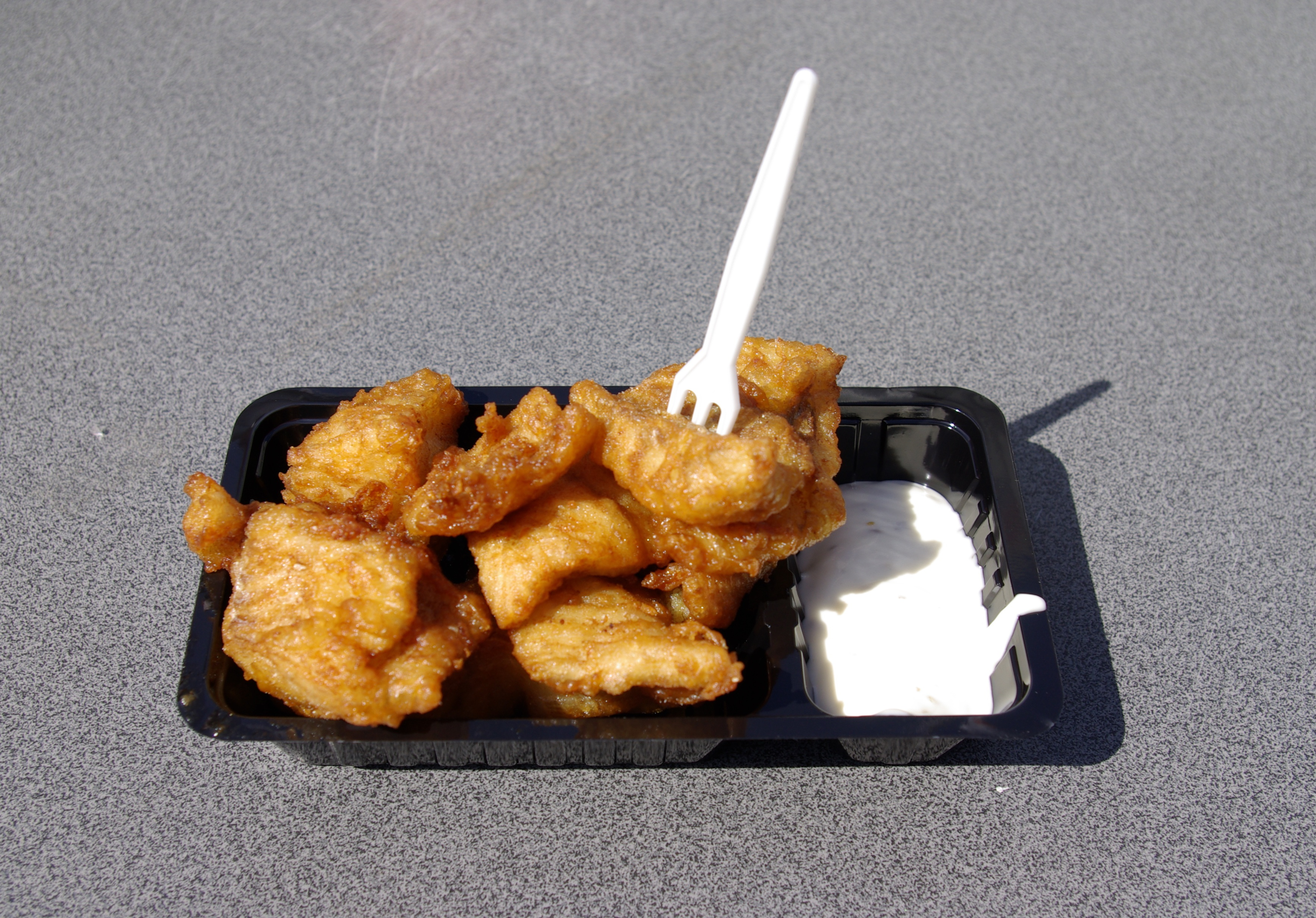 Kibbeling met Knoflooksaus